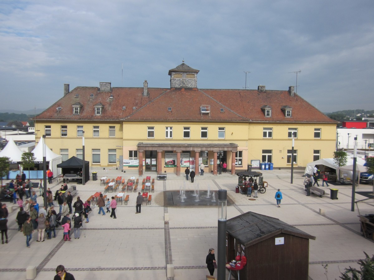 Empfangsgebäude dea Bahnhofes Frankenberg (Eder), auf dem Vorplatz Feiern zur Wiedereröffnung der Strecke nach Korbach (12. September 2015)